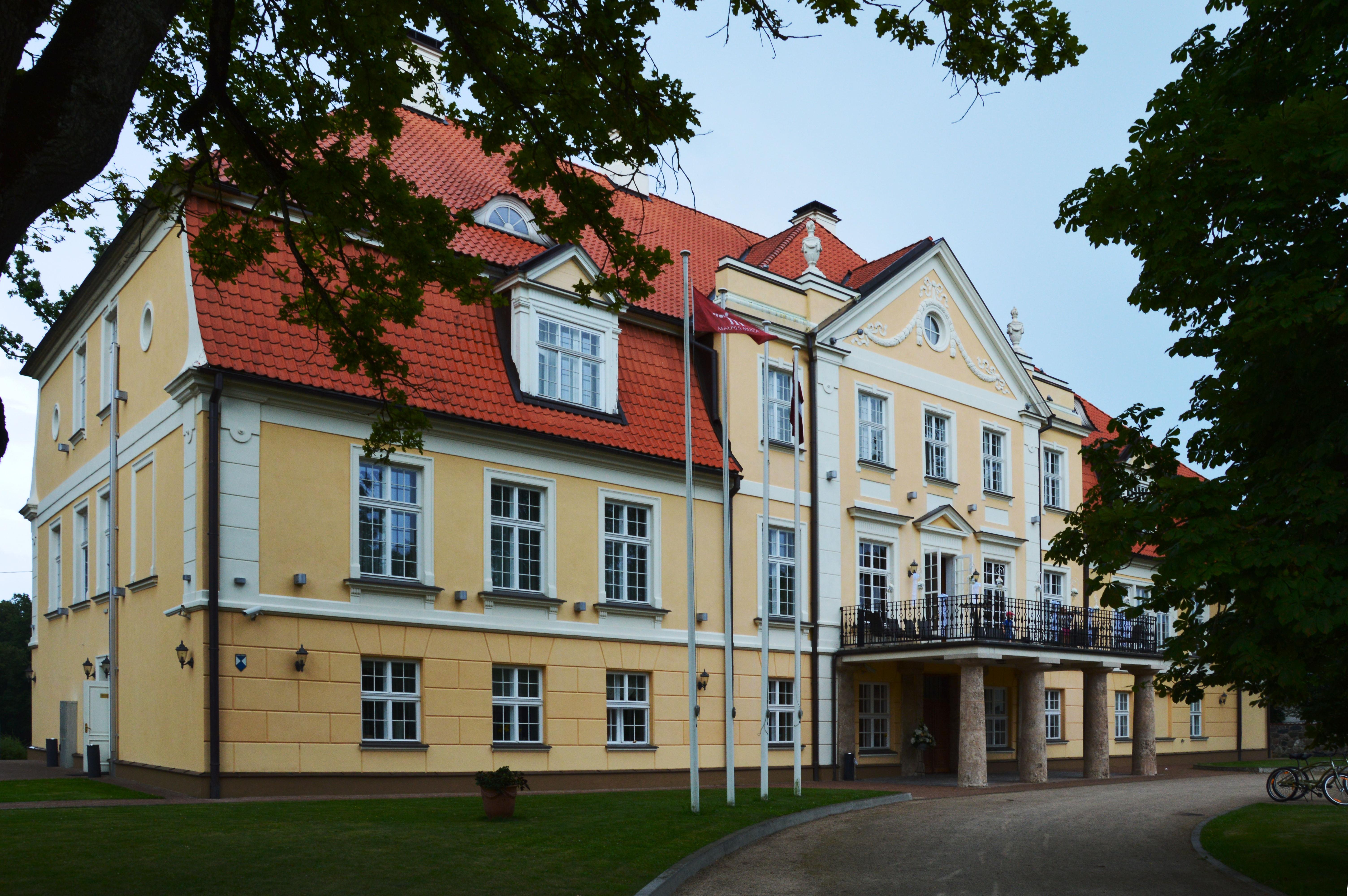 Mālpils muižas apbūve, Mālpils, Pils iela 6